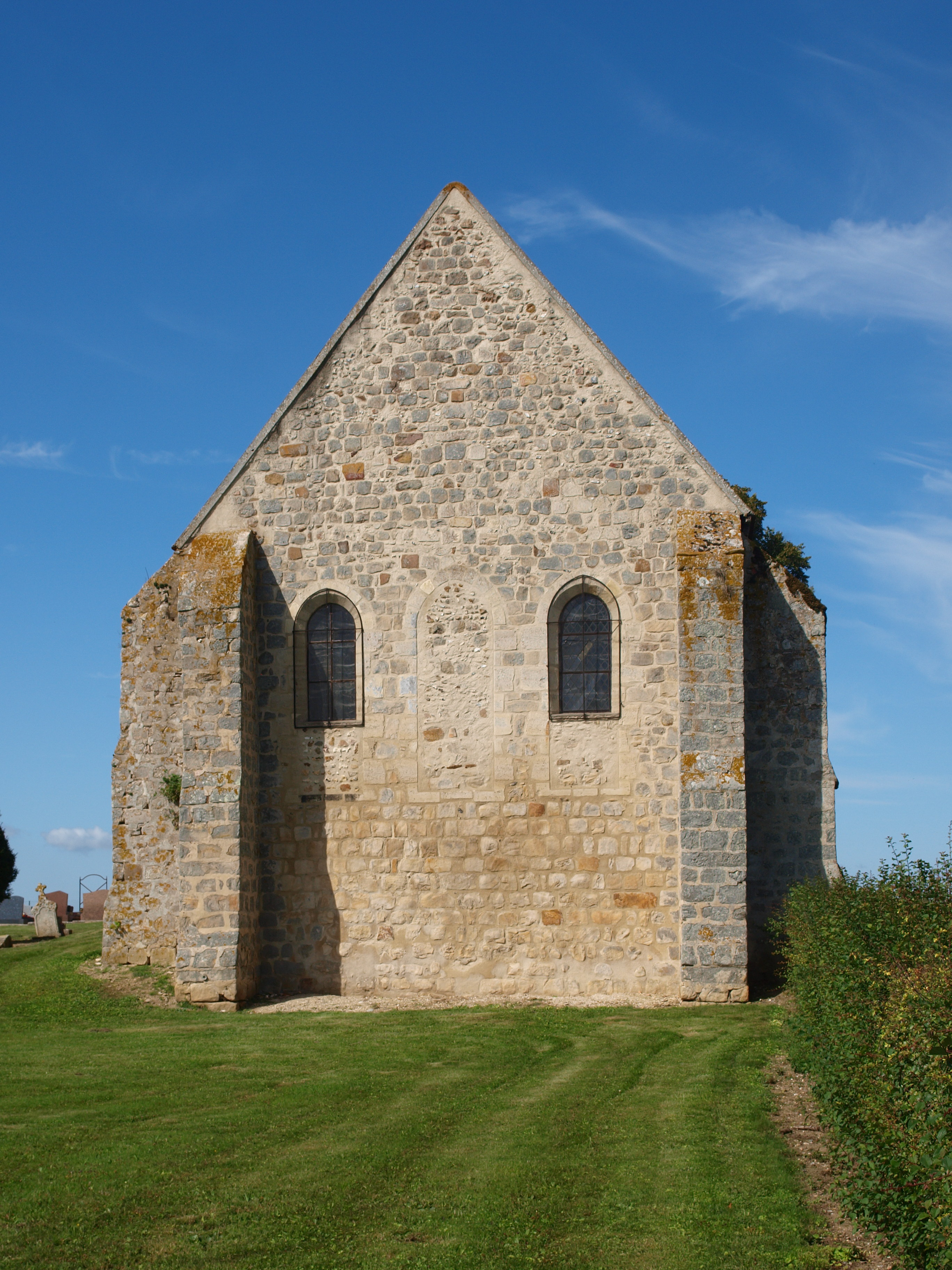 Perceneige (Yonne, France) ; village de Plessis-du-Mée : église